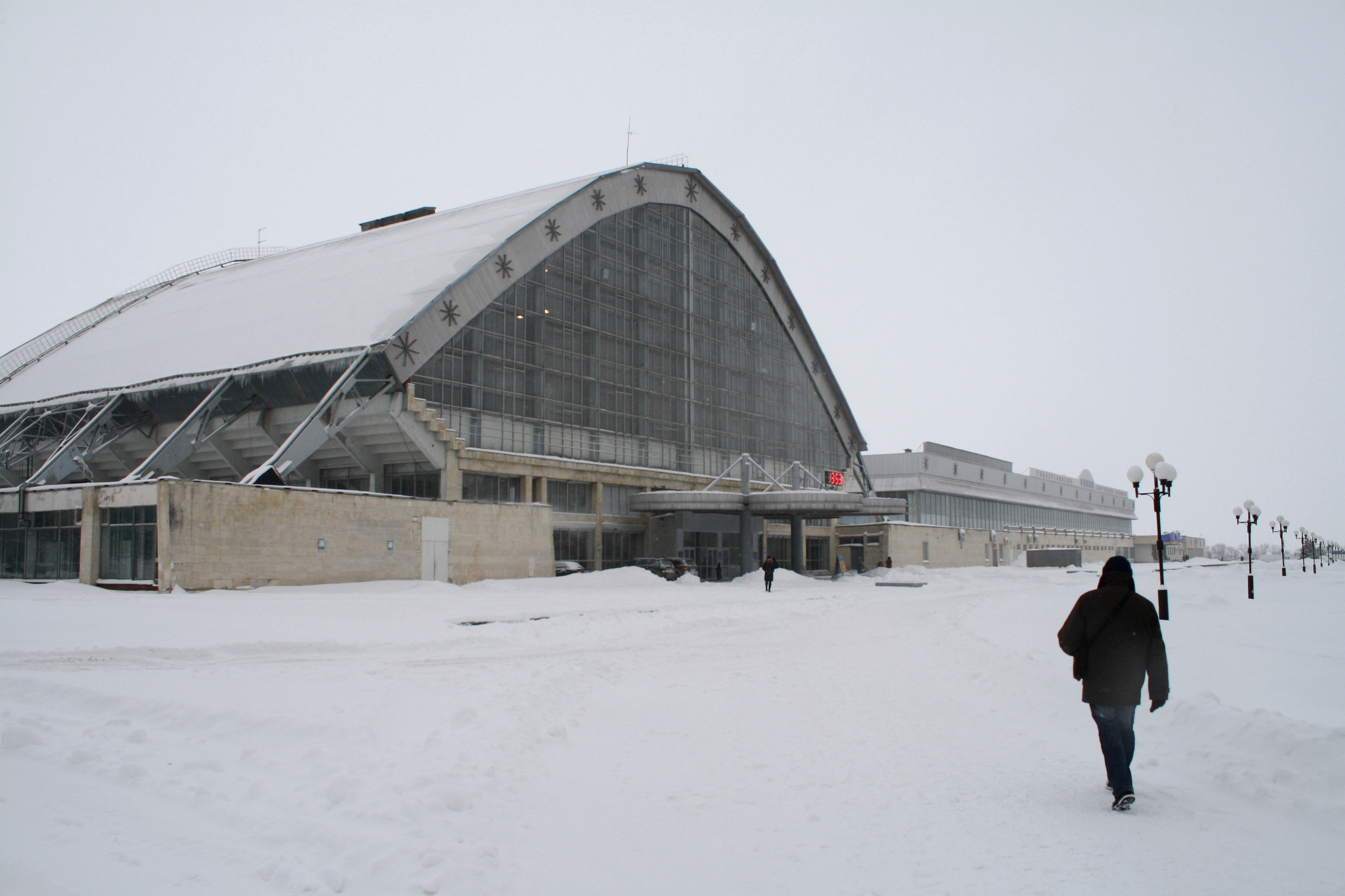 Вид на универсальный спорткомплекс Олимп г.Тольятти. Зима 2012 г.